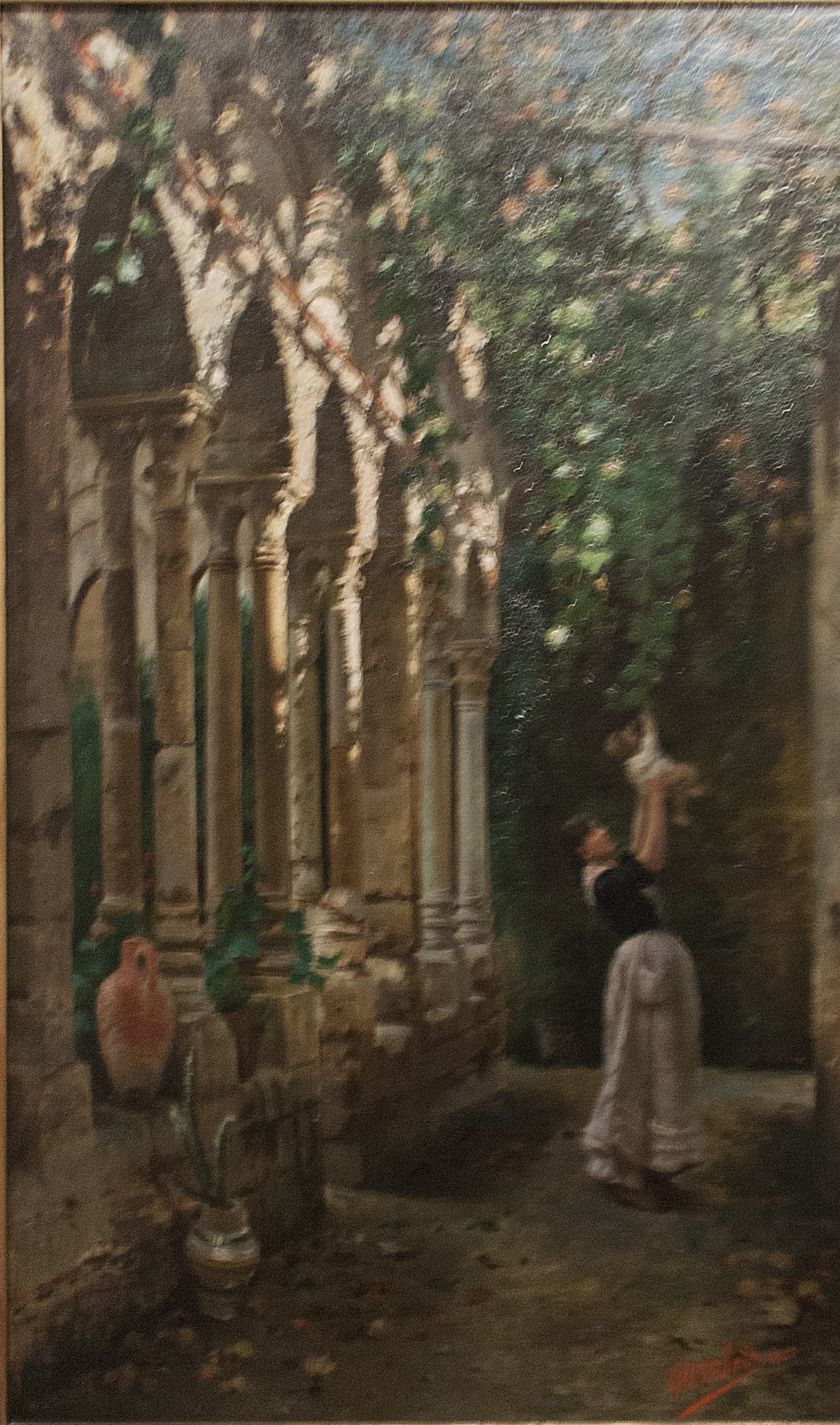 Chiostro di San Giovanni degli Eremiti - Giovanni Lombardo Calamia olio su tela 1885